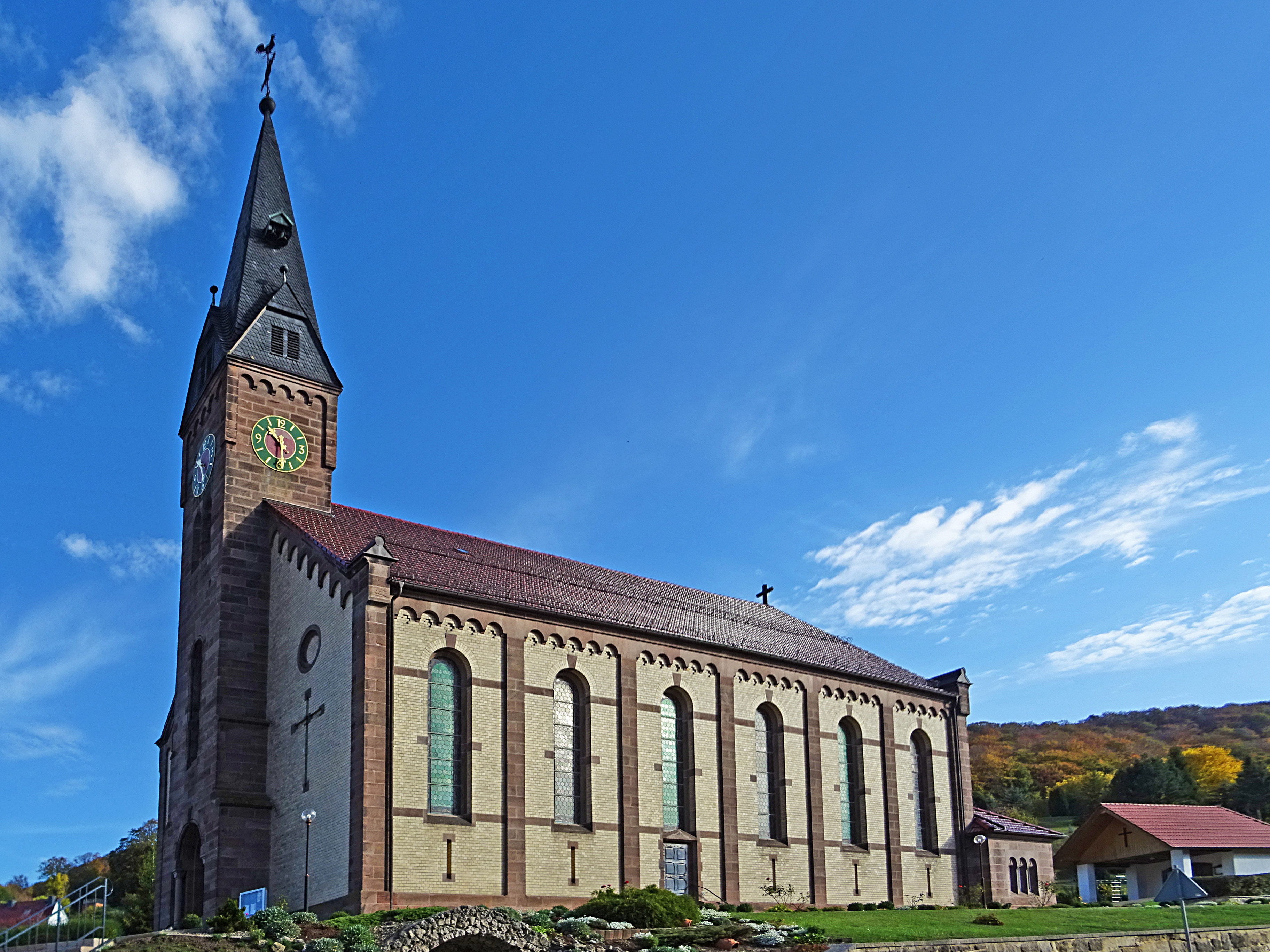 Neuromanische Dorfkirche St. Mauritius in Lutter (Eichsfeld)